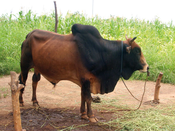 Ajout d'image #1Lib1Ref